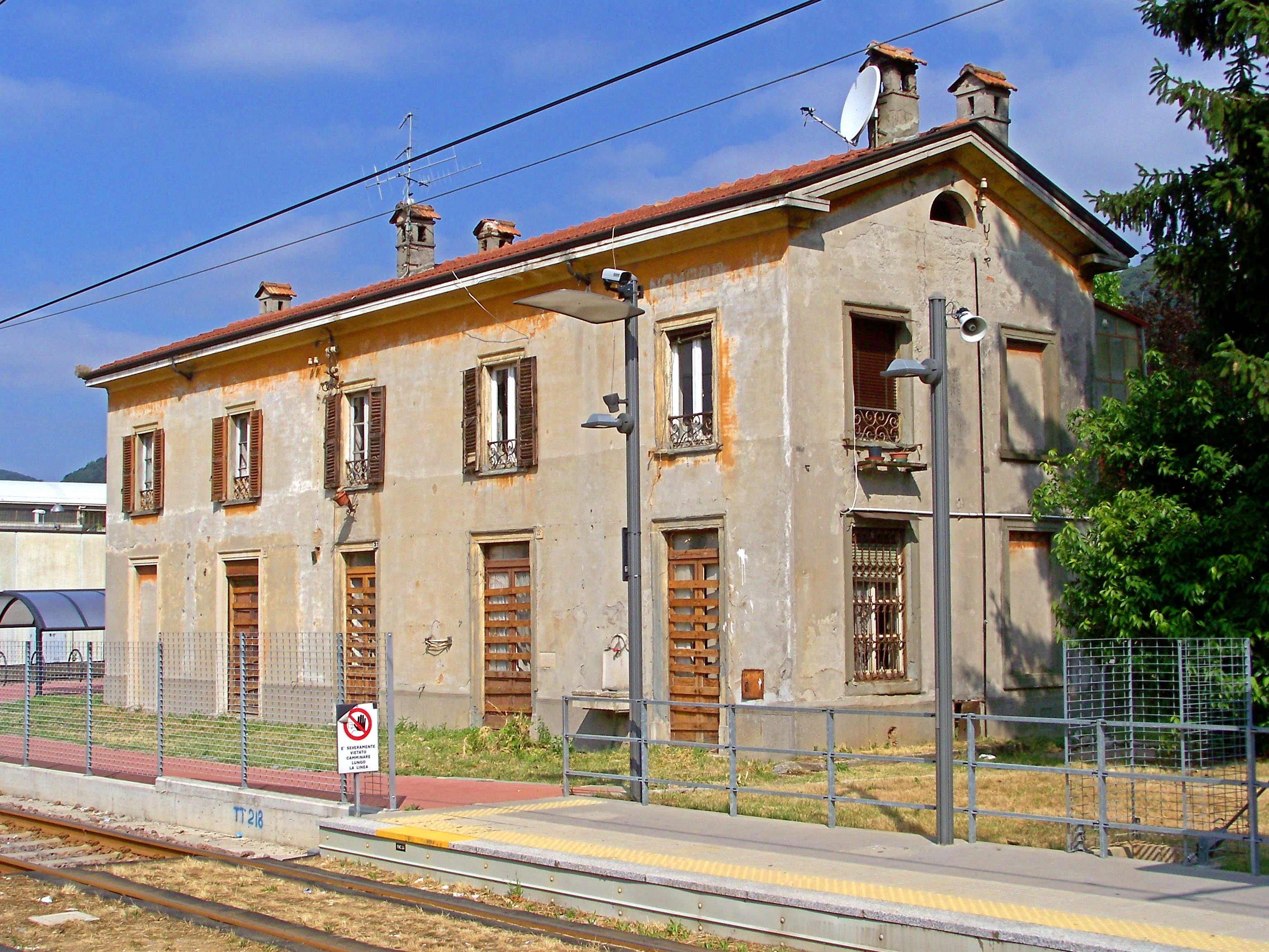 Il lato campagna del fabbricato viaggiatori della dismessa stazione di Nembro sulla ferrovia della Val Seriana